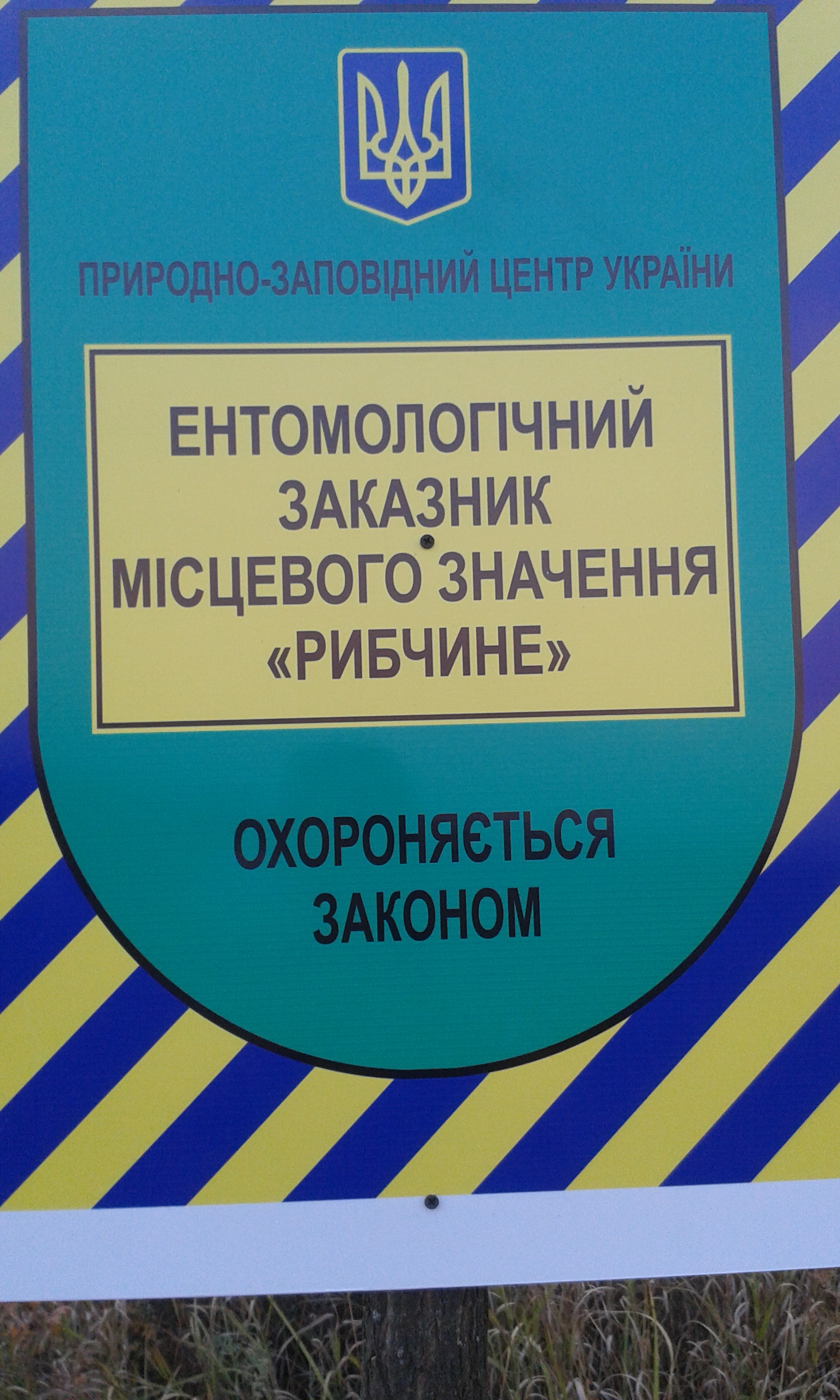 Знак державної охорони урочища Рибчине